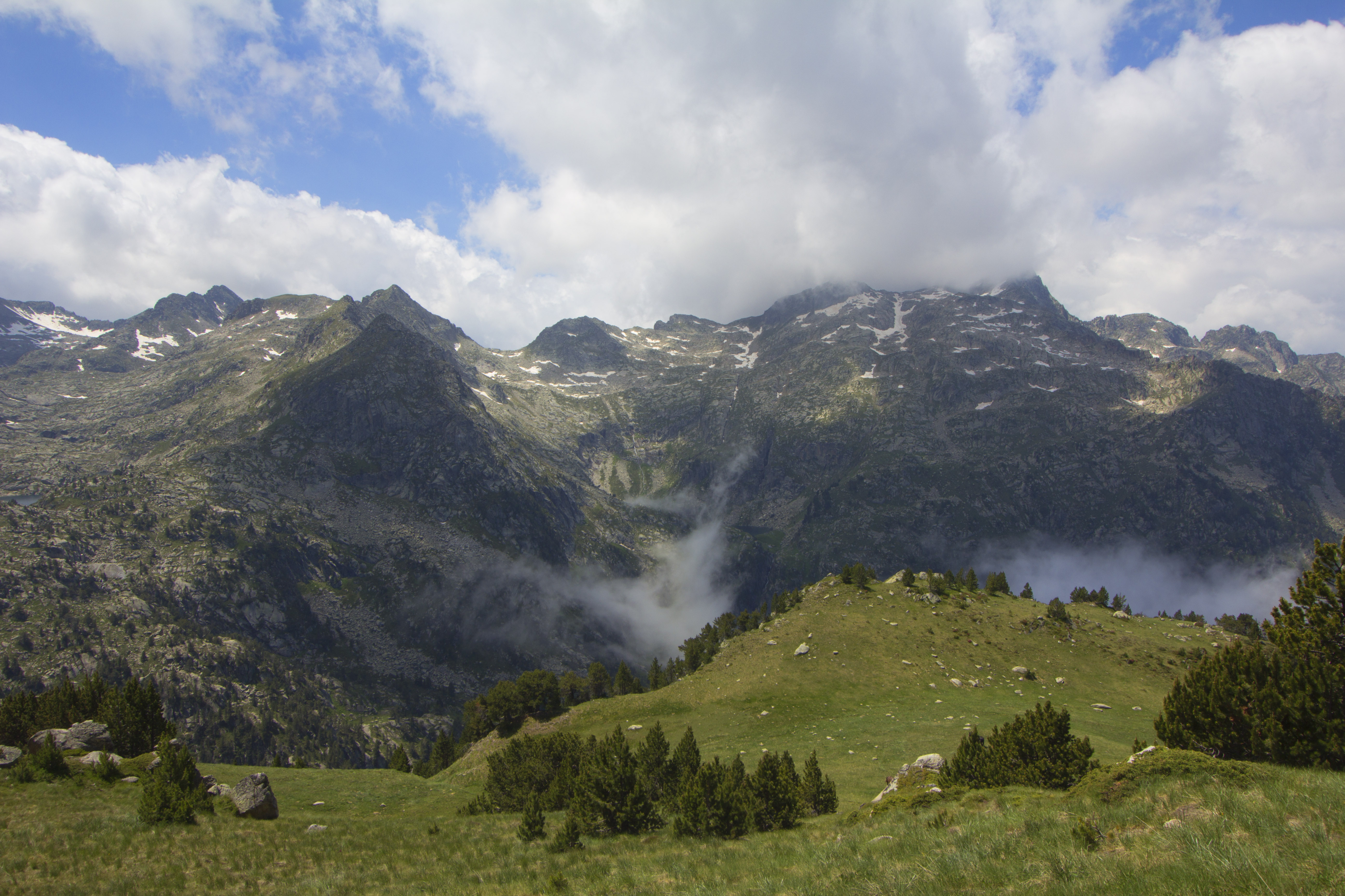 Circ del Montardo, a la vall d'Aran